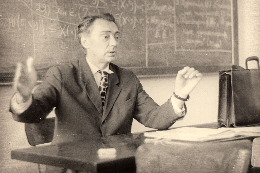 Александр Александрович Зыков читает лекцию, 1970-е годы.